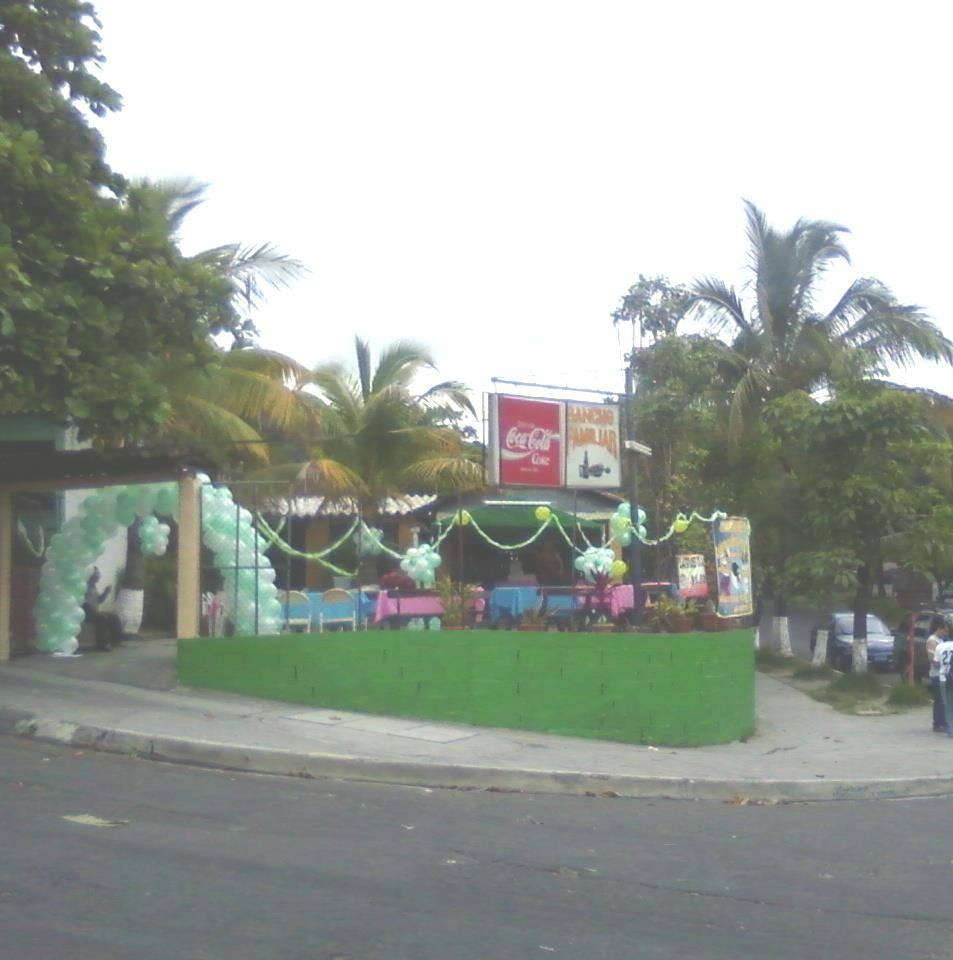 Colonias aledañas al centro de Soyapango.